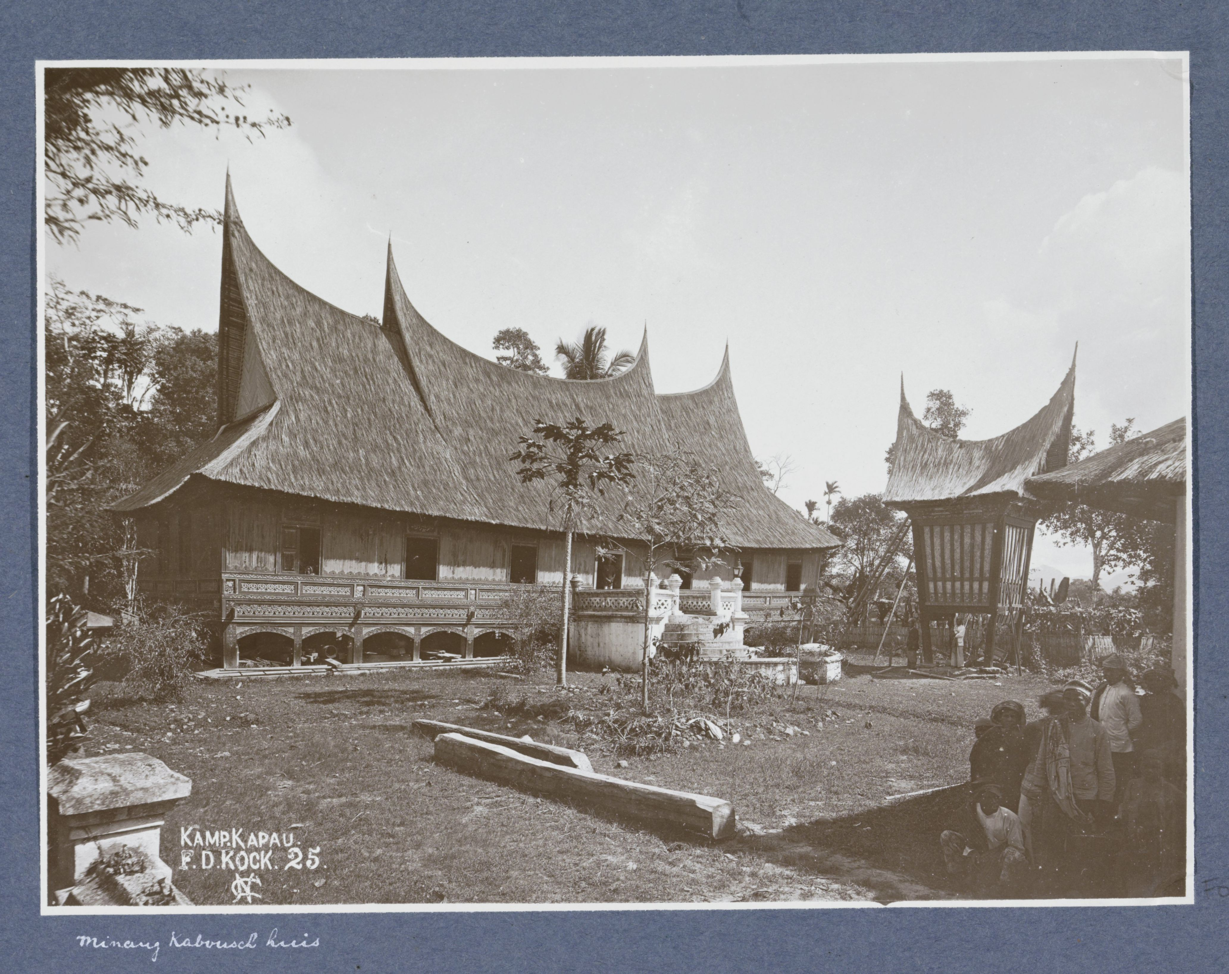 IdentificatieTitel(s): Exterieur van een Minangkabouhuis op SumatraKamp. Kapau F.D. Kock (titel op object)Objecttype: foto albumblad Objectnummer: RP-F-F01149-DEOpschriften / Merken: nummer, recto: ‘25’Omschrijving: Onderdeel van Reisalbum met foto's van bedrijvigheid en beziensWaar: digheden op Sumatra en Java en van de reis naar en van Nederlands-Indië.VervaardigingVervaardiger: fotograaf: Christiaan Benjamin NieuwenhuisPlaats vervaardiging: SumatraDatering: ca. 1900 - ca. 1920Fysieke kenmerken: ontwikkelgelatinezilverdrukMateriaal: papier fotopapier Techniek: ontwikkelgelatinezilverdrukAfmetingen: foto: h 198 mm × b 266 mmOnderwerpWat: exterior ~ representation of a buildingWaarSumatraVerwerving en rechtenVerwerving: overdracht van beheer 1994Copyright: Publiek domein